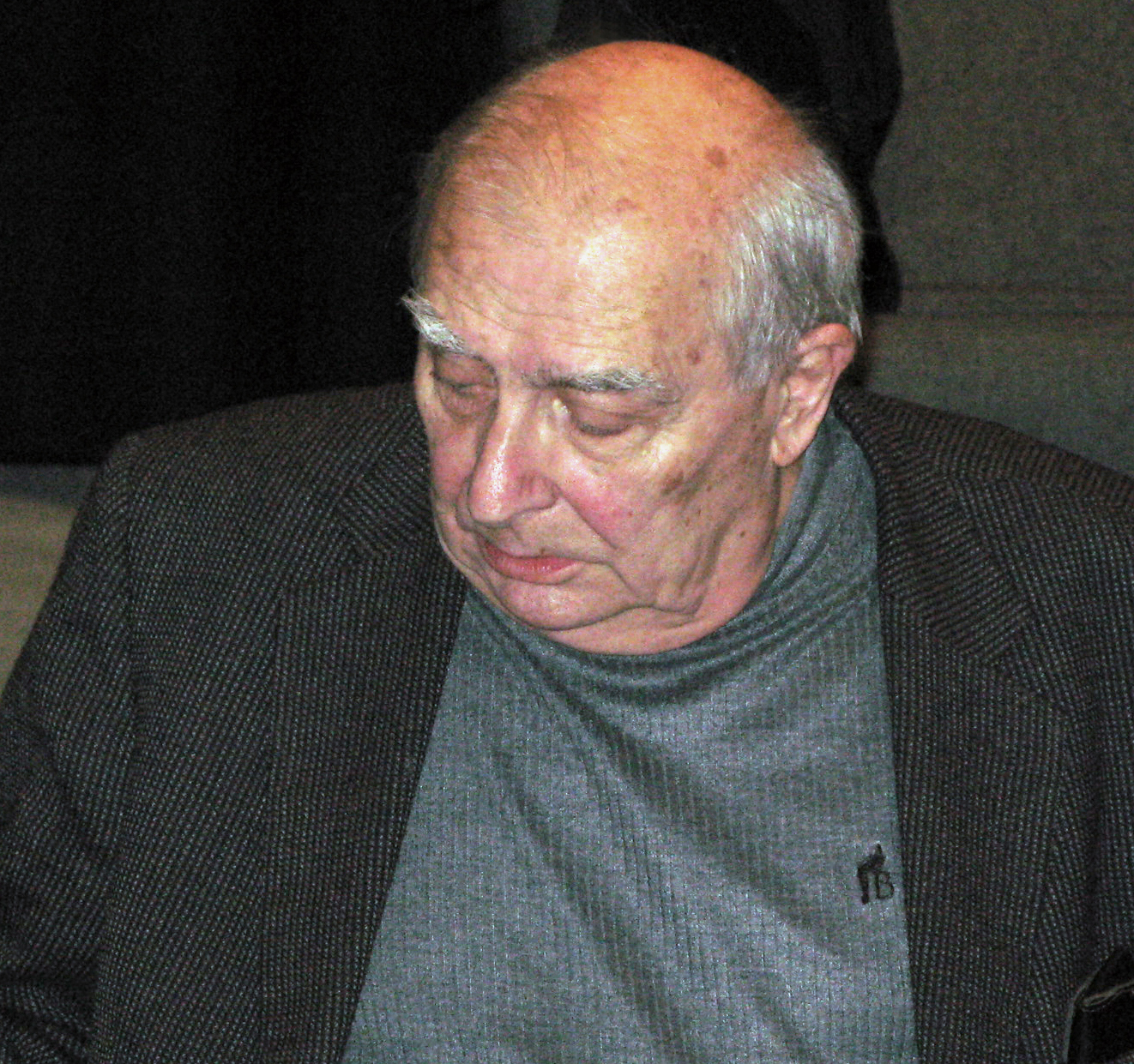 Claude Chabrol, à Amiens (Somme, France) - De passage à la "Maison de la Culture" lors du « 28ème Festival international du film d'Amiens ». Après une séance improvisée de signature d'autographes dès son arrivée dans une salle pleine, Claude Chabrol vient de se désaltérer avant son intervention publique.